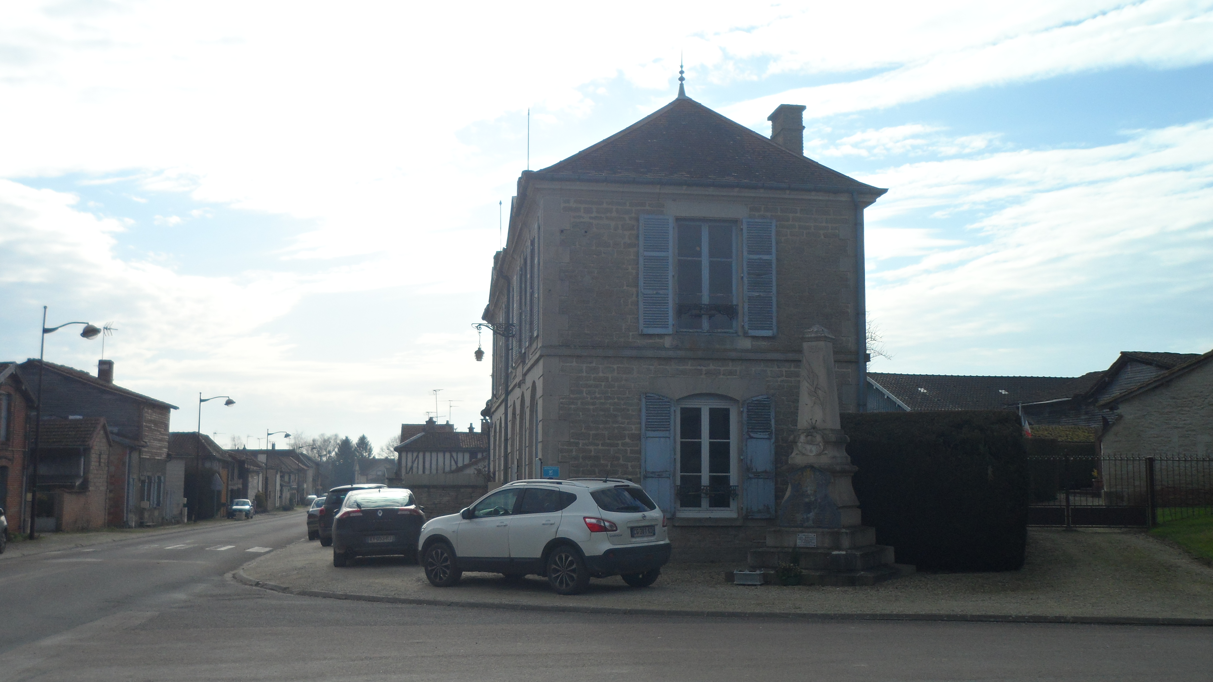 Monument aux morts à coté de la mairie